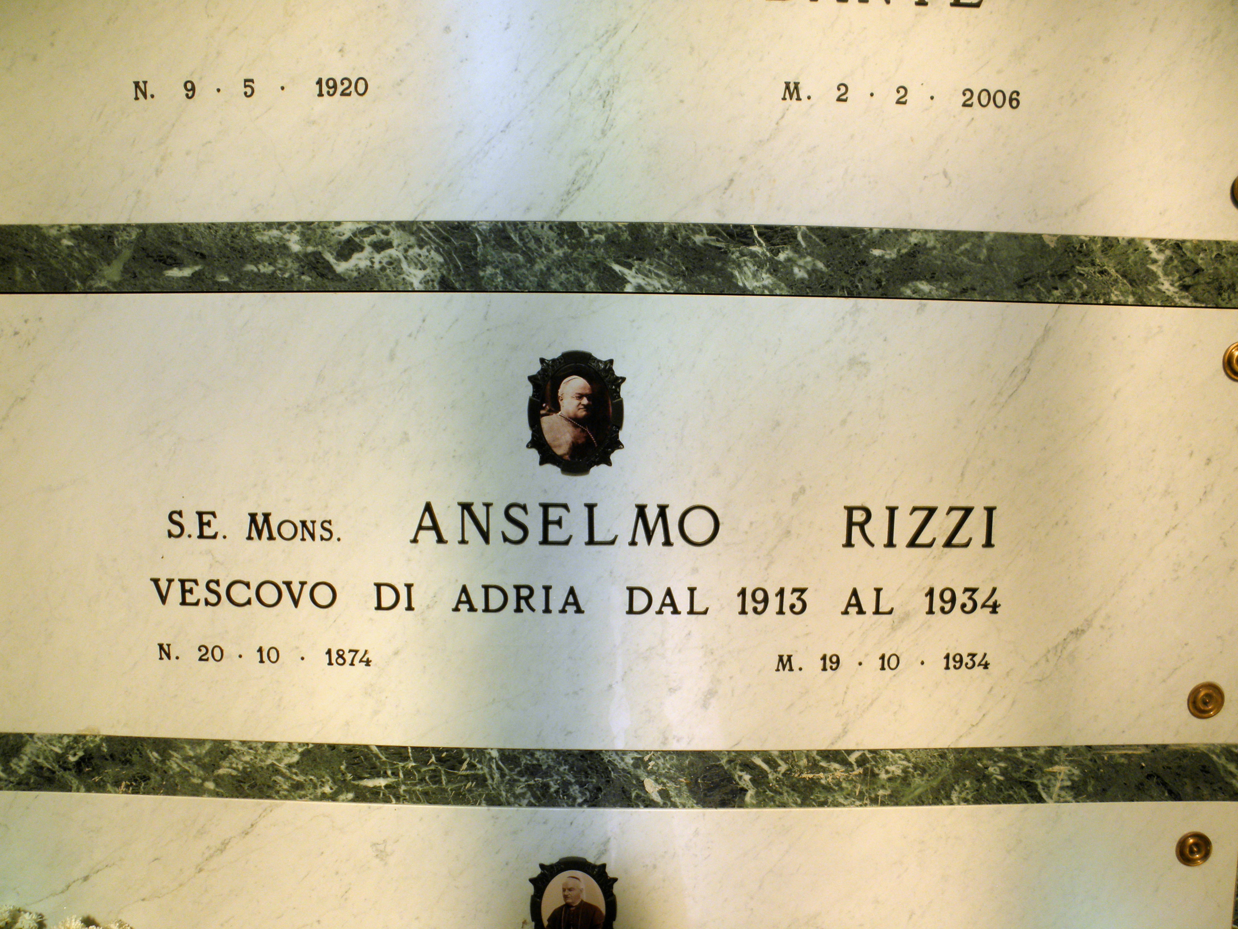 Cimitero di Rovigo: la tomba di Monsignor Anselmo Rizzi, Vescovo della Diocesi di Adria dal 4 giugno 1913 al 21 ottobre 1934.